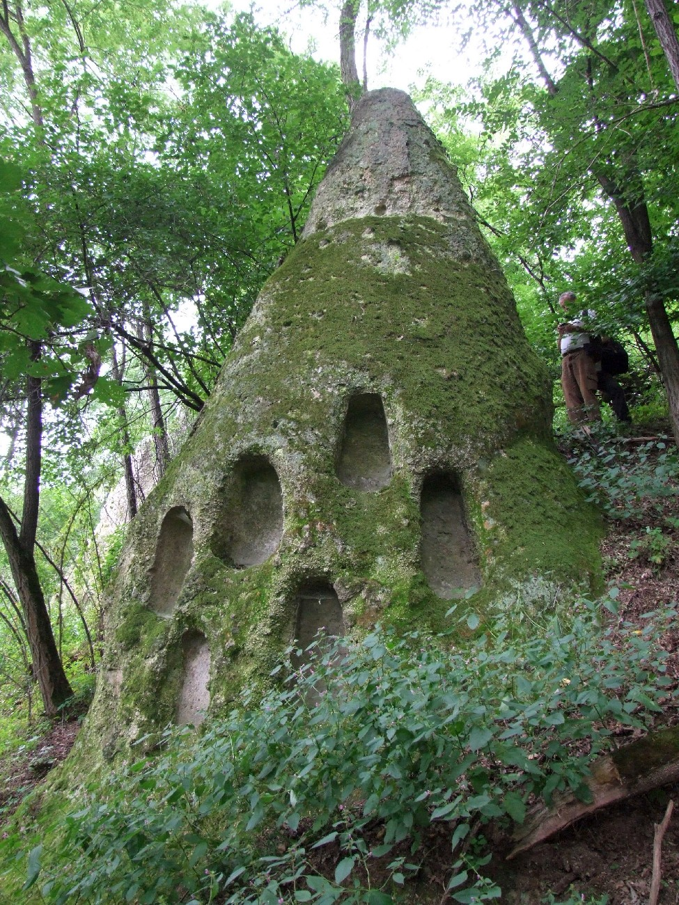 B4g, Cserépváralja, Furgál-völgy, 1. kúp